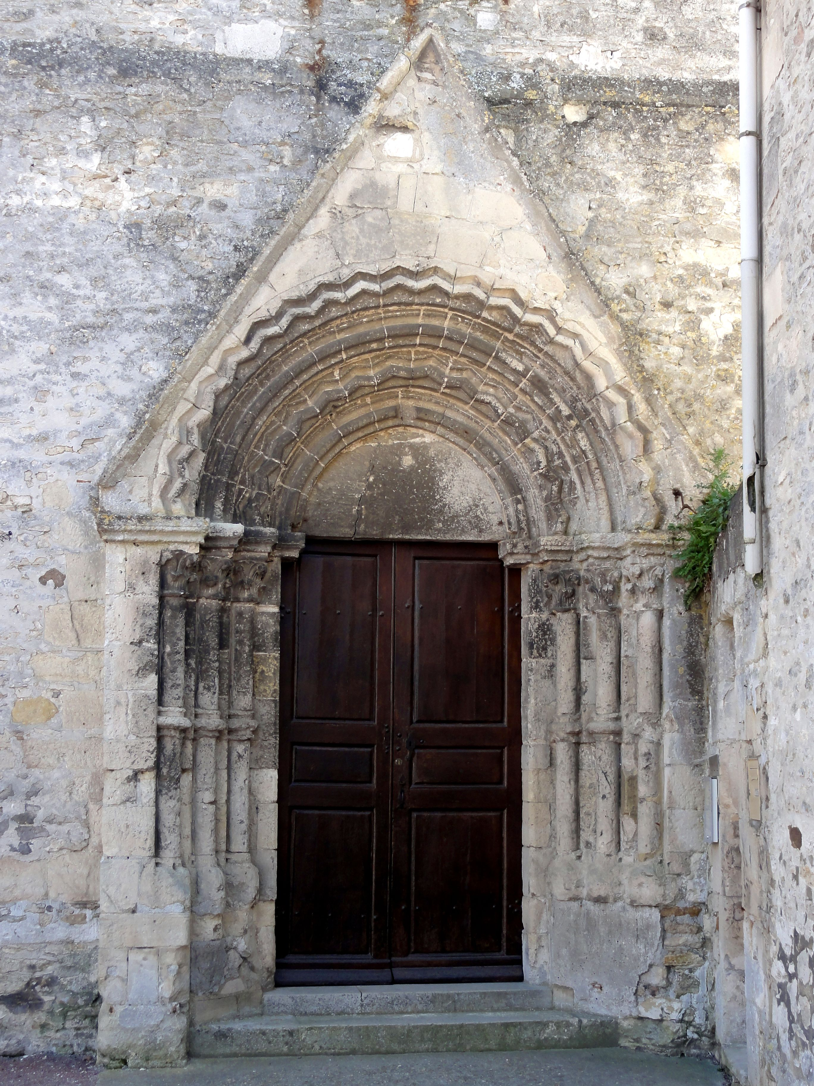 Portail occidental.